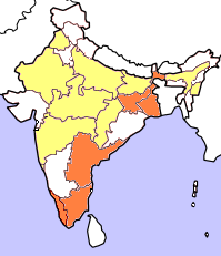 Kartan bygger på resultatet från valet till Lok Sabha april/maj 2004. Gult betyder att partiet lanserat en eller flera kandidater i delstaten, dock utan att vinna mandat. Orange betyder att partiet vunnit mandat från delstaten. Rött betyder att partiet vunnit minst 25% av mandaten från den delstaten och mörkrött 50% eller mer. Kartan tar inte hänsyn till avhopp, partifusioner och fyllnadsval under den ordinarie mandatperiodens gång. Gjord av Soman.